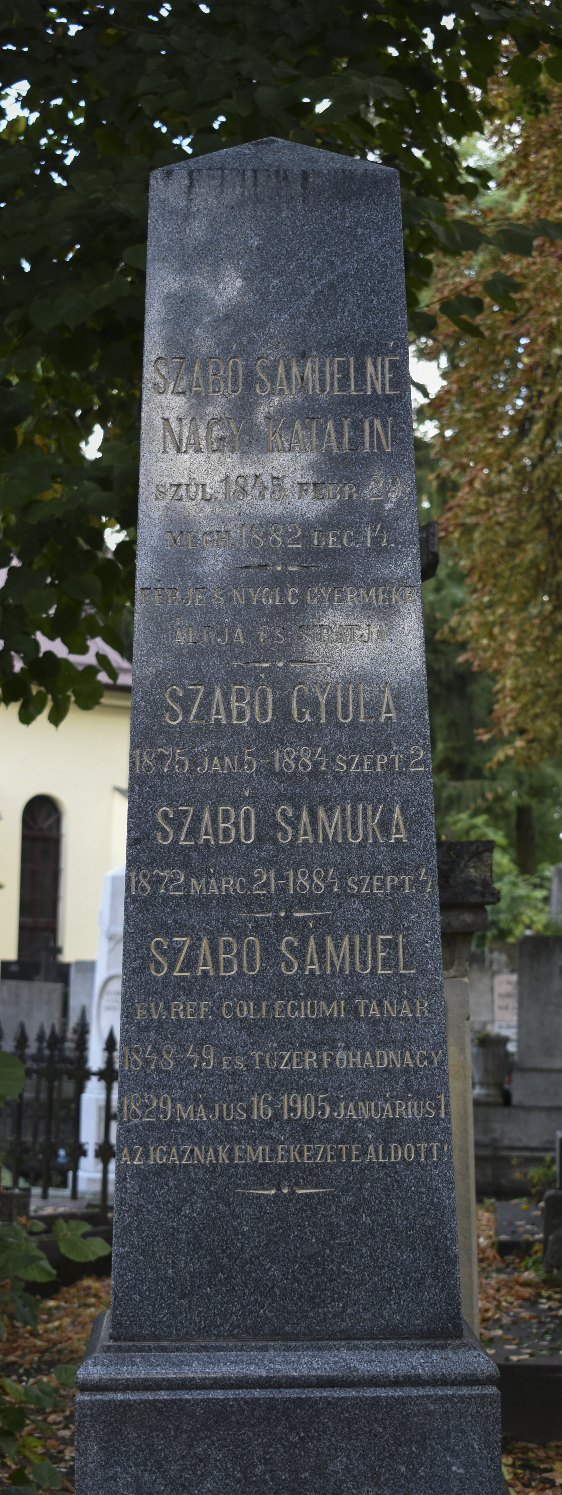 Mormânt Szabó Sámuel (1829-1905) 047